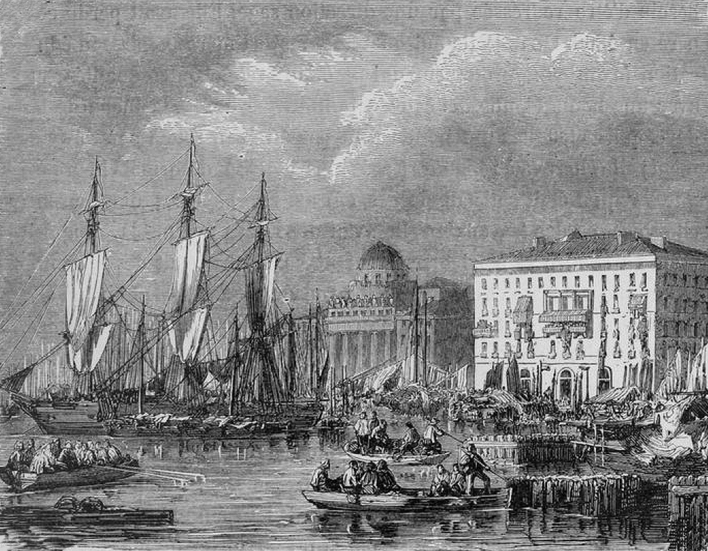 a